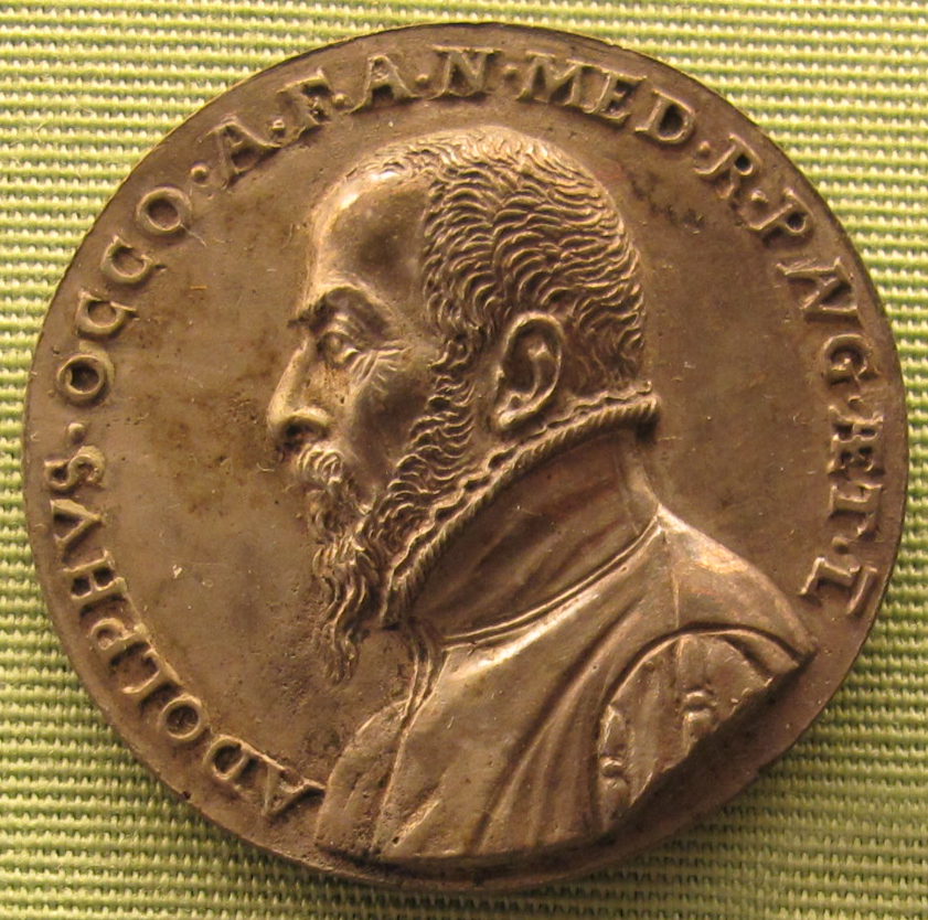 Balduin drentwett, adolph occo III, 1574